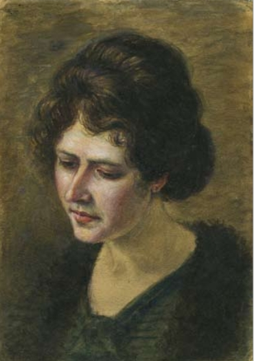 Porträtstudie einer Frau von Franz Mohr (1899). Handschriftlicher Kommentar des Malers auf der Rückseite „Meine erste Aquarellkopfstudie nach der Natur 1900, nach 1/4 jährigem privaten Zeichenunterricht", Ortsarchiv Müschede